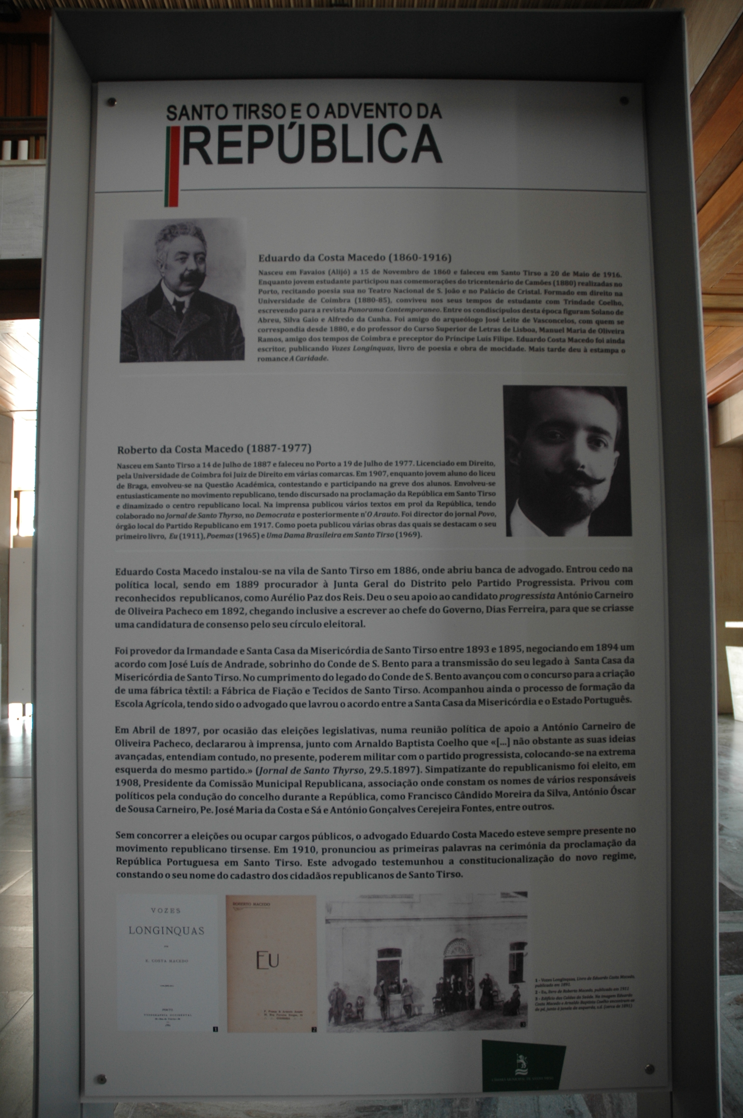 Comemoração em Santo Tirso do centenário da Republica Eduardo da Costa Macedo e Roberto da Costa Macedo